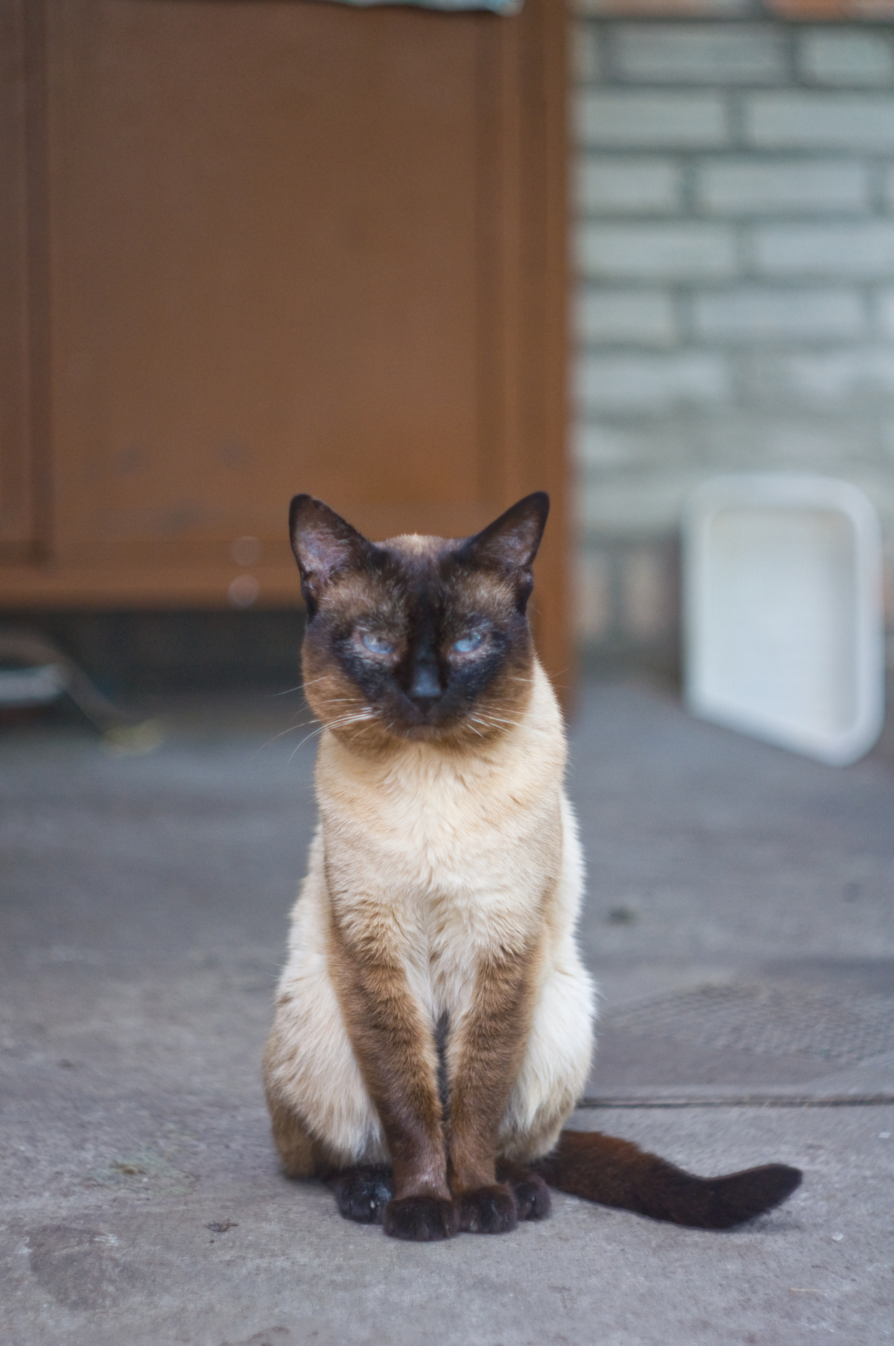 Сиамский кот.